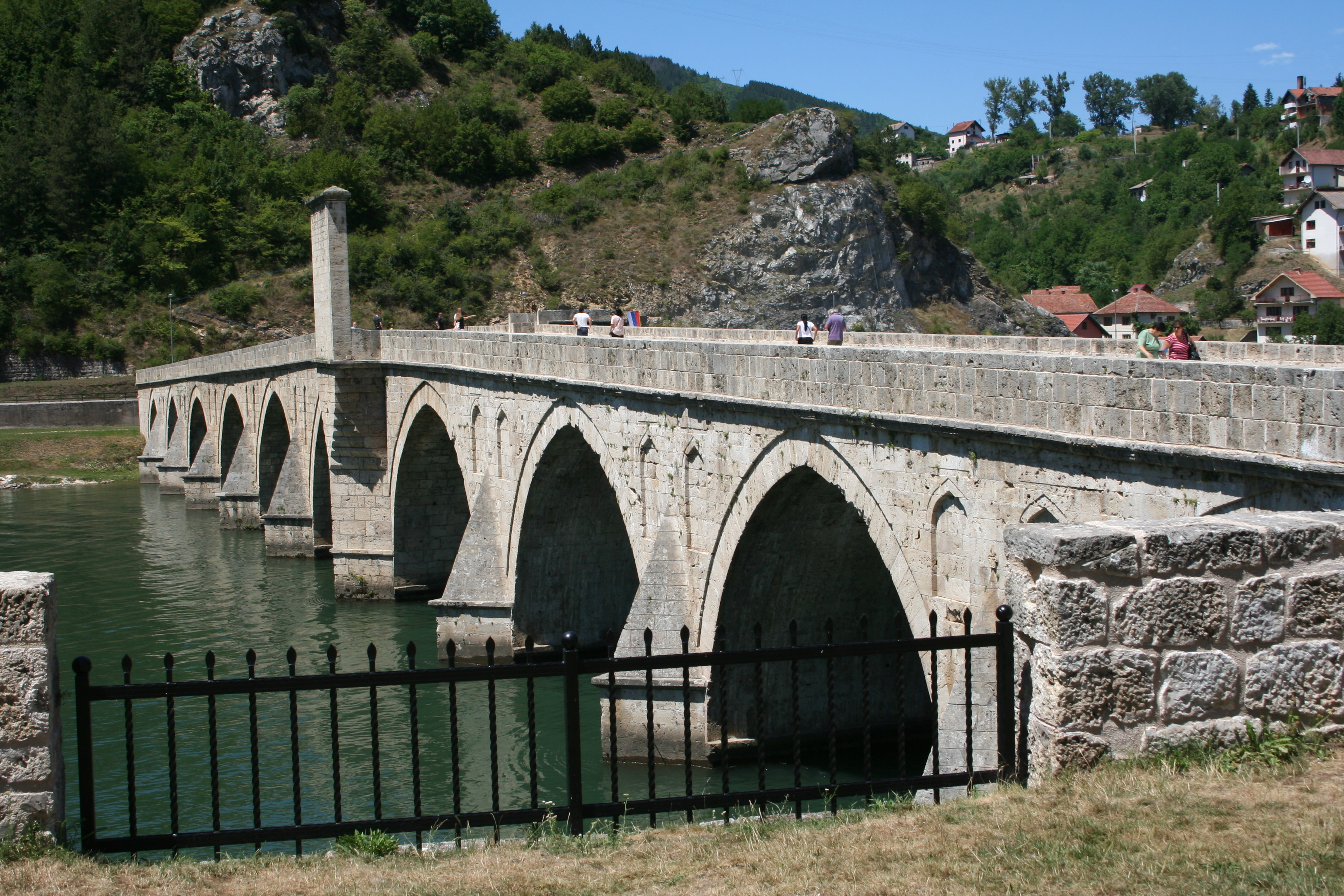 Višegrad